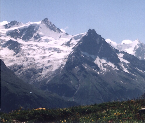 (français) Besso, la montagne au deux pics jumeaux, vu depuis Sorebois (nord-ouest) dans le val d'Anniviers en Suisse